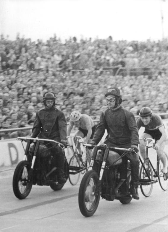 Peter Gröning, Lothar Meister Zentralbild Kohls 17.8.1958 Me Gröning triumphierte über Weltmeister Begeisternde Steherrennen bei der Weltmeister-Revanche Von 7000 Zuschauern stürmisch umjubelt, absolvierte am 16. August 1958 Peter Gröning (SC Dynamo Berlin) als verdienter Sieger der Berliner Weltmeisterschafts-Revanche der Amateur-Dauerfahrer die Ehrenrunde auf der Radrennbahn Weißensee. In dramatischen Kämpfen brachte Gröning dem vor sieben Tagen in Leipzig gekürten Welt-Titelträger Lothar Meister I die erste Niederlage bei. UBz:Gröning (links) geht in der entscheidenden Phase des Rennens an Lothar Meister I vorbei.